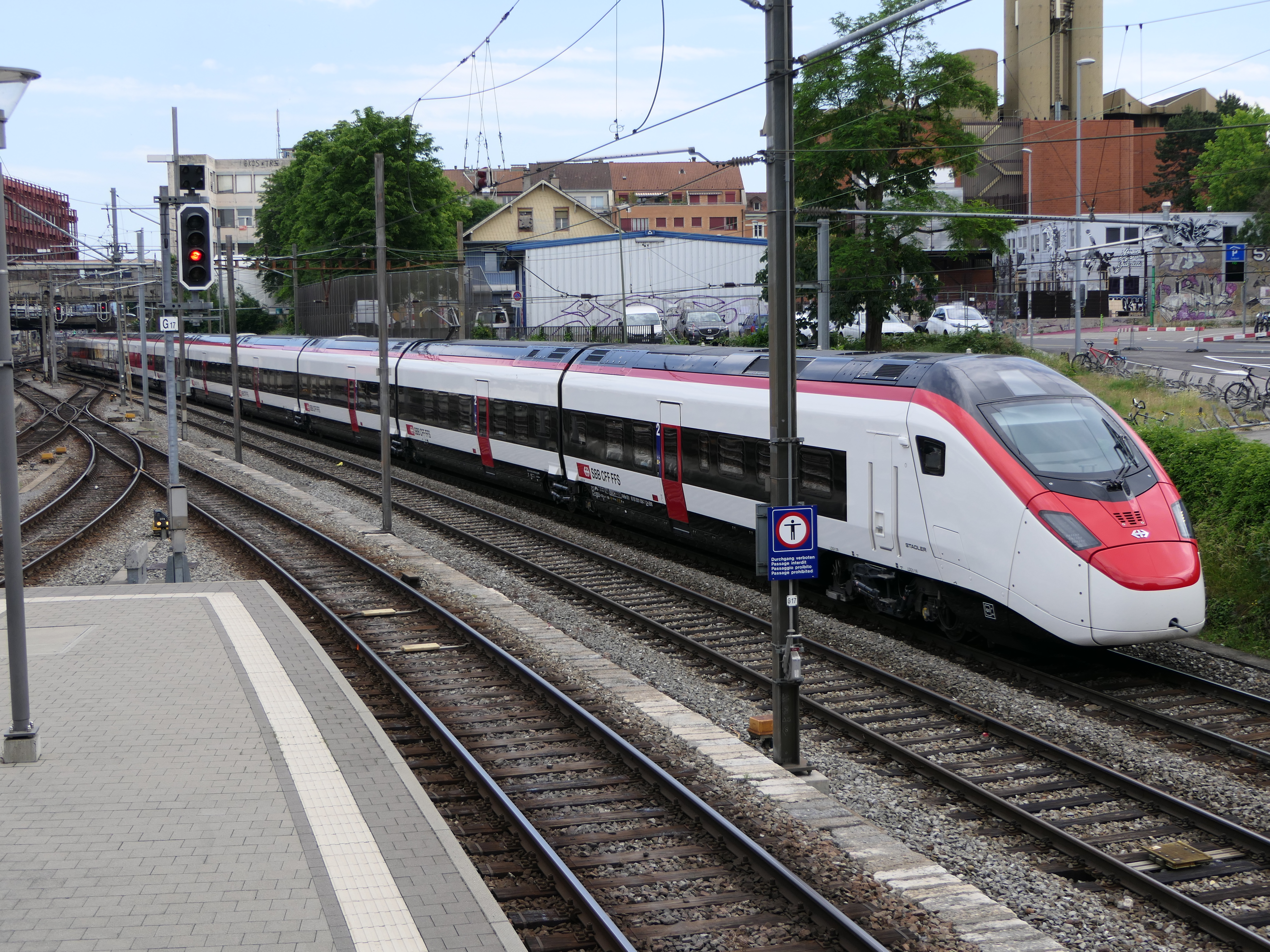 Schweizer Hochgeschwindigkeitszug "SMILE" der Firma Stadler, der bei der SBB auf den Namen "Giruno" hört. Hier der RABe 501 006 am Bahnhof Basel SBB.